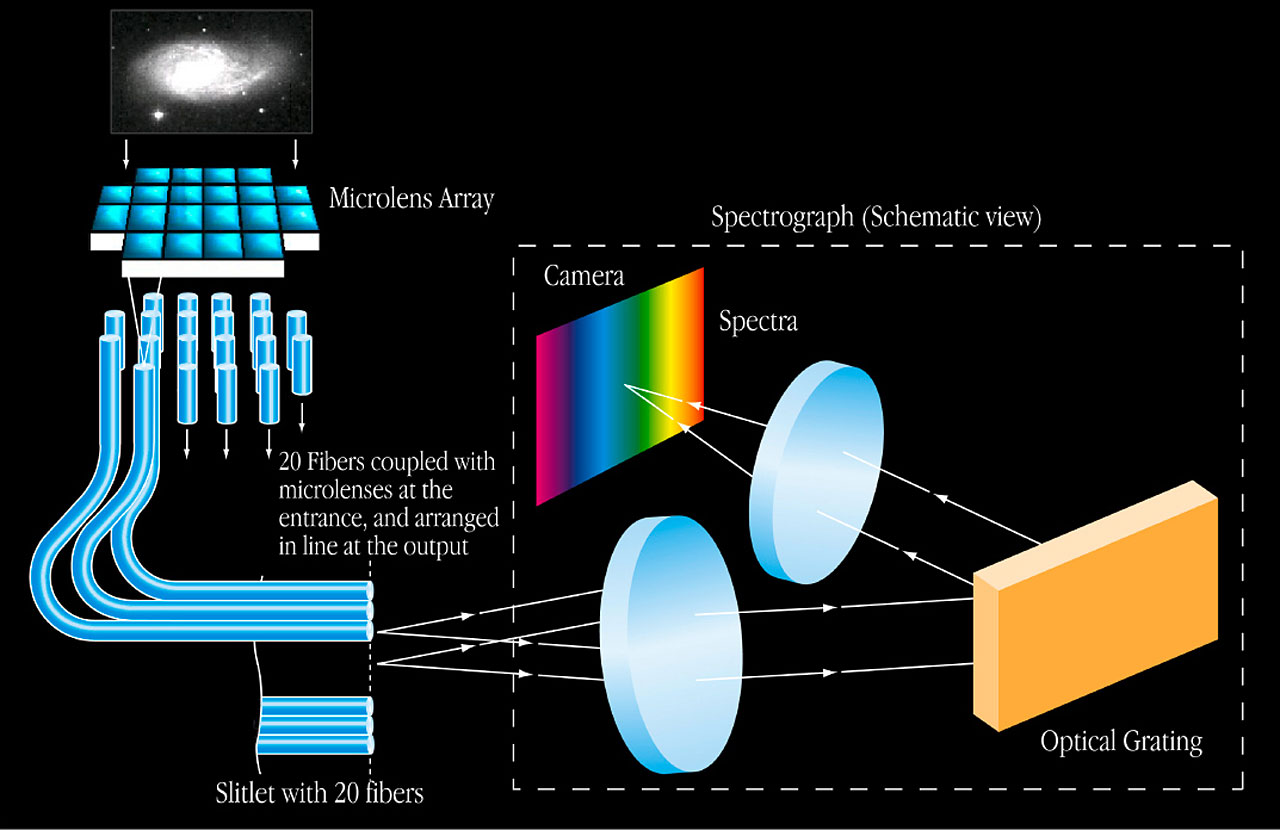 Principio di funzionamento di una IFU a microlenti: l'immagine astronomica viene amplificata da una matrice di microlenti le quali ne amplificano una limitata sezione, prima di trasferirla allo spettrografo